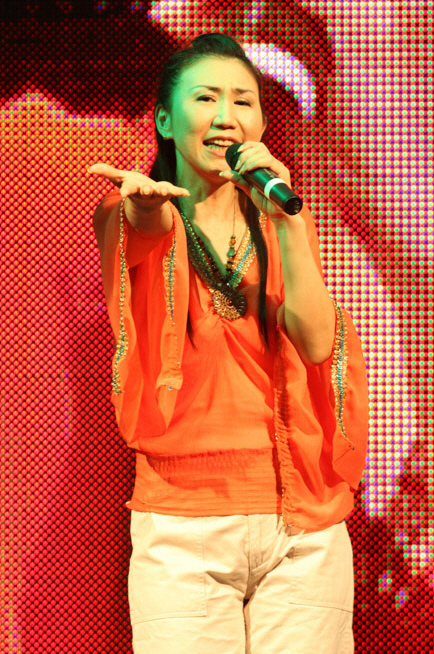 高橋 洋子（たかはし ようこ、1966年8月28日- ）